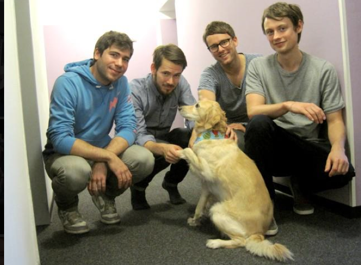 Backstage mit Hund (2013)